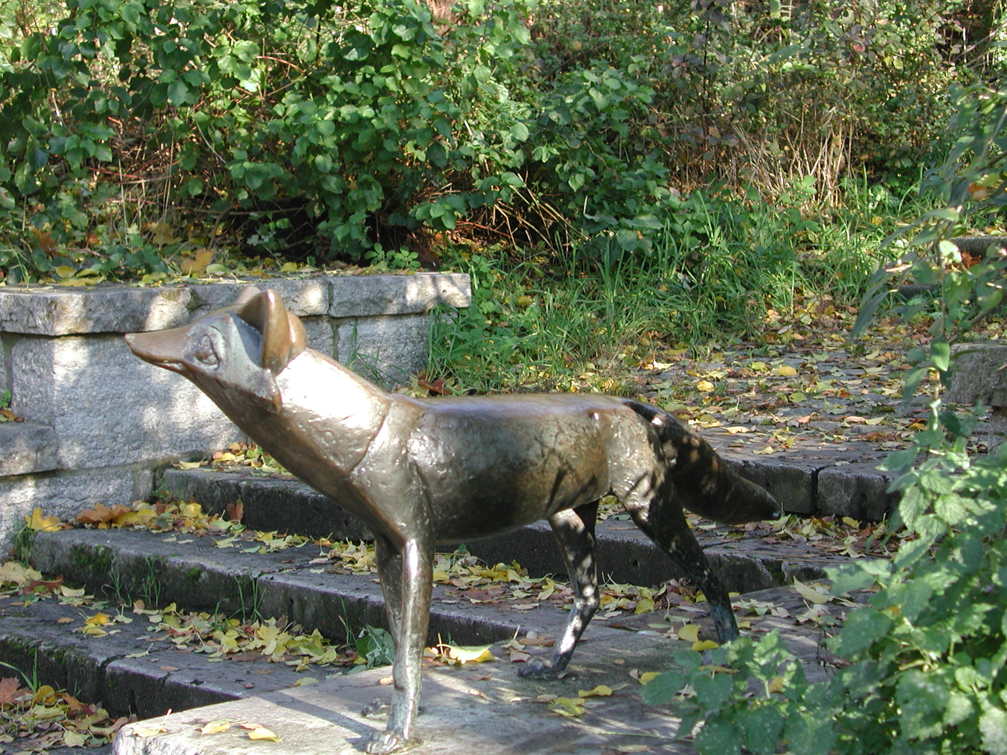 Junger Fuchs von Stephan Horota